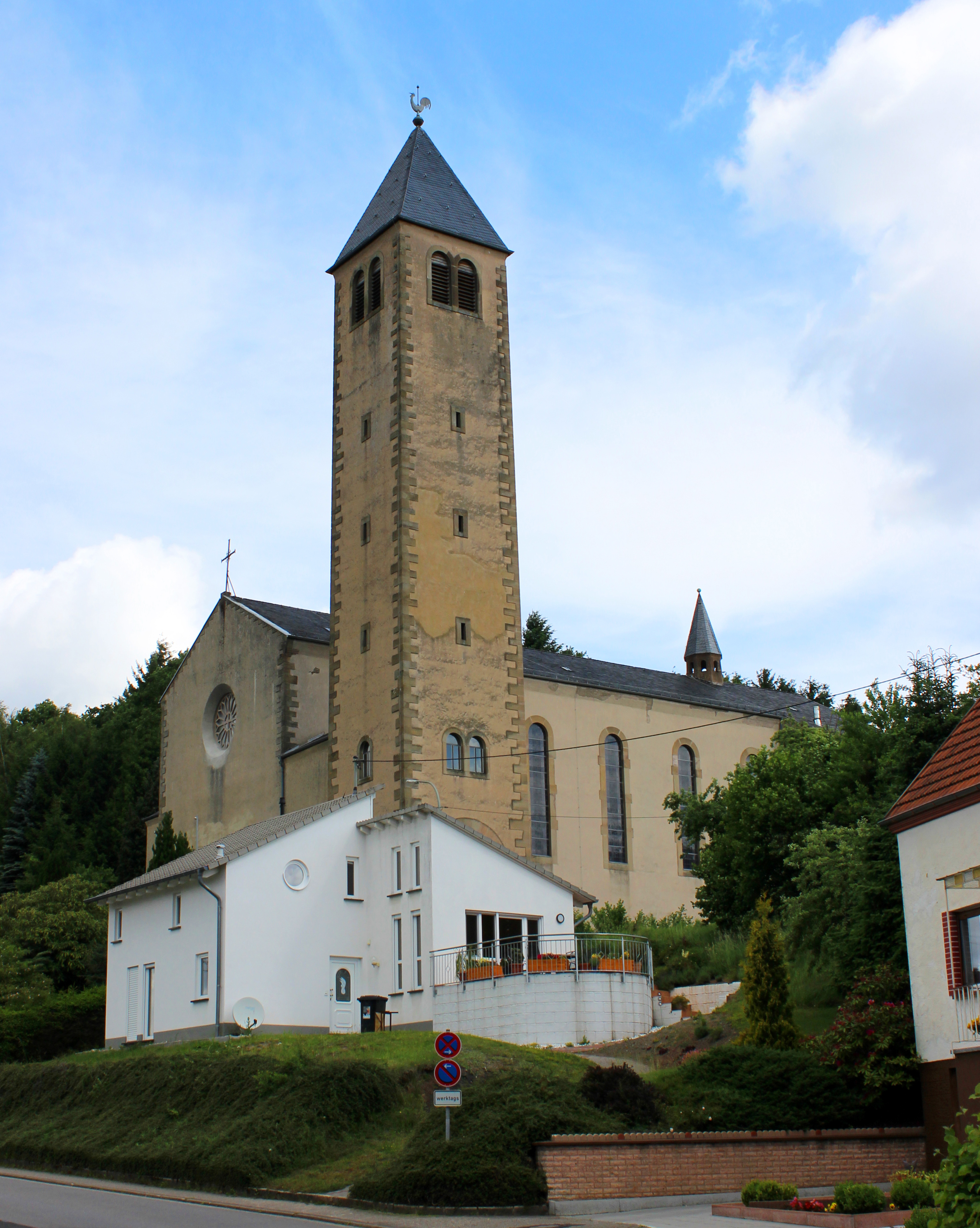 Die katholische Kirche St. Willibrord in Baltersweiler, Gemeinde Namborn, Kreis St. Wendel, Saarland